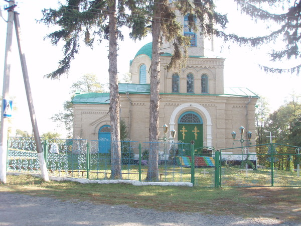 Башҡортса: Винница өлкәһе, Жмеринка районы